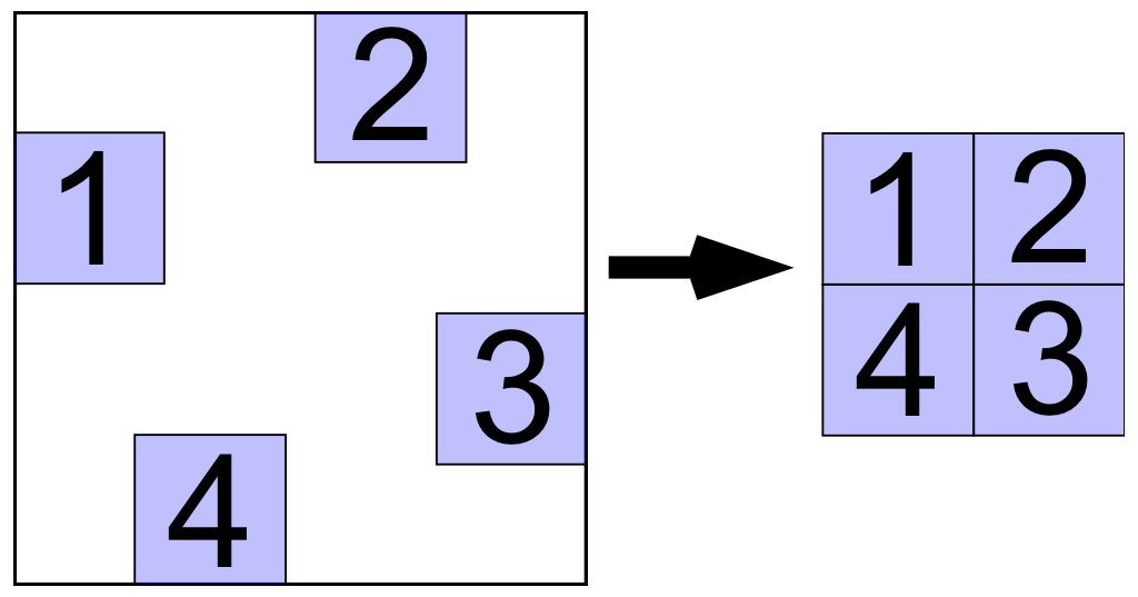 Beispiel für ein Faltpuzzle